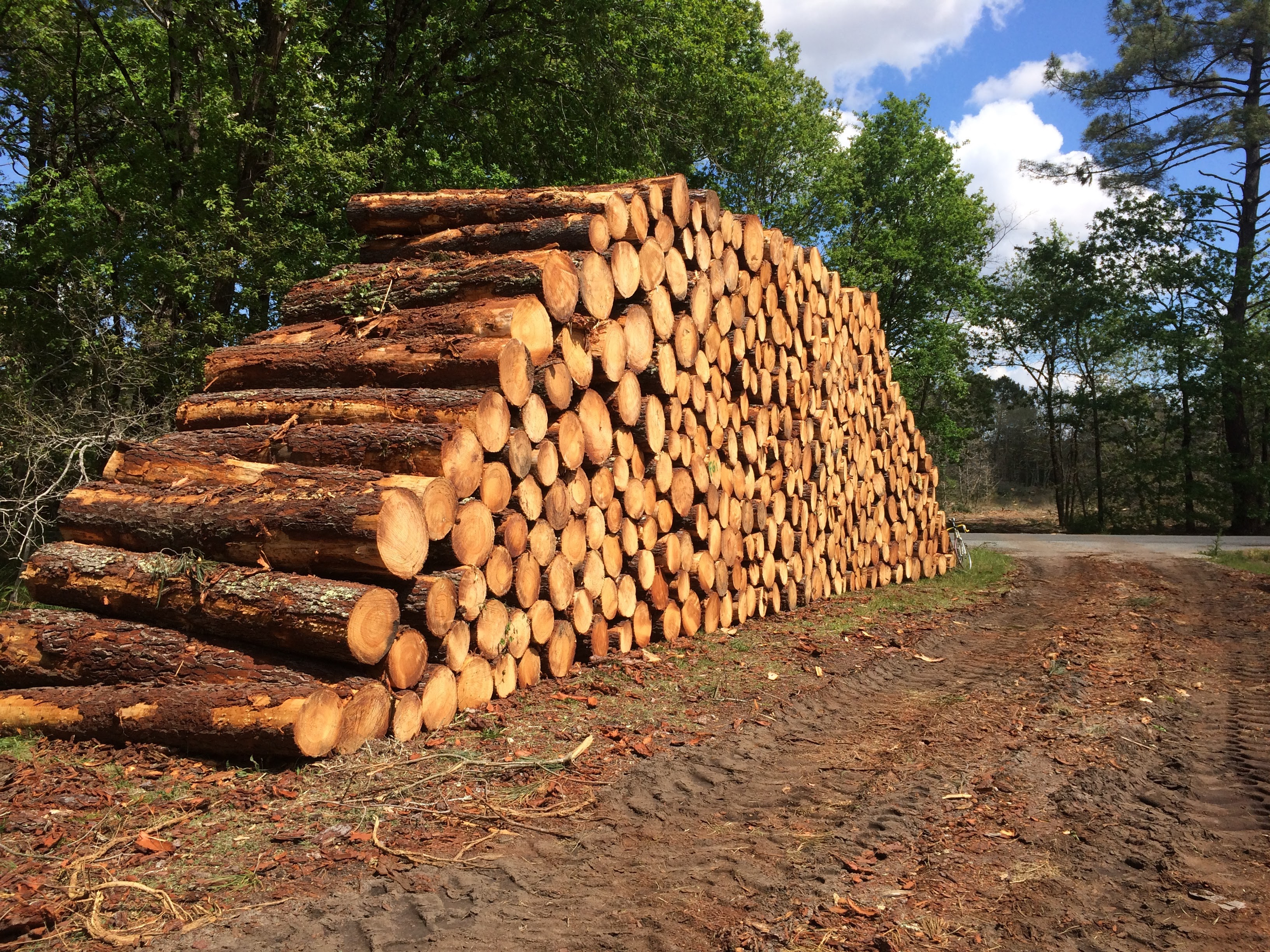 Les pins sont coupés régulièrement pour alimenter les usines à papier (Biganos, Mimizan) et les scieries locales. Une partie de plus en plus importante du bois de coupe est utilisée pour les usines à biomasse.